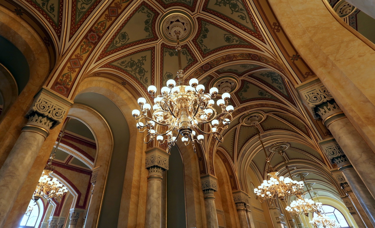 Pesti Vigadó. Földszinti 'keresztfolyosó'. - Budapest